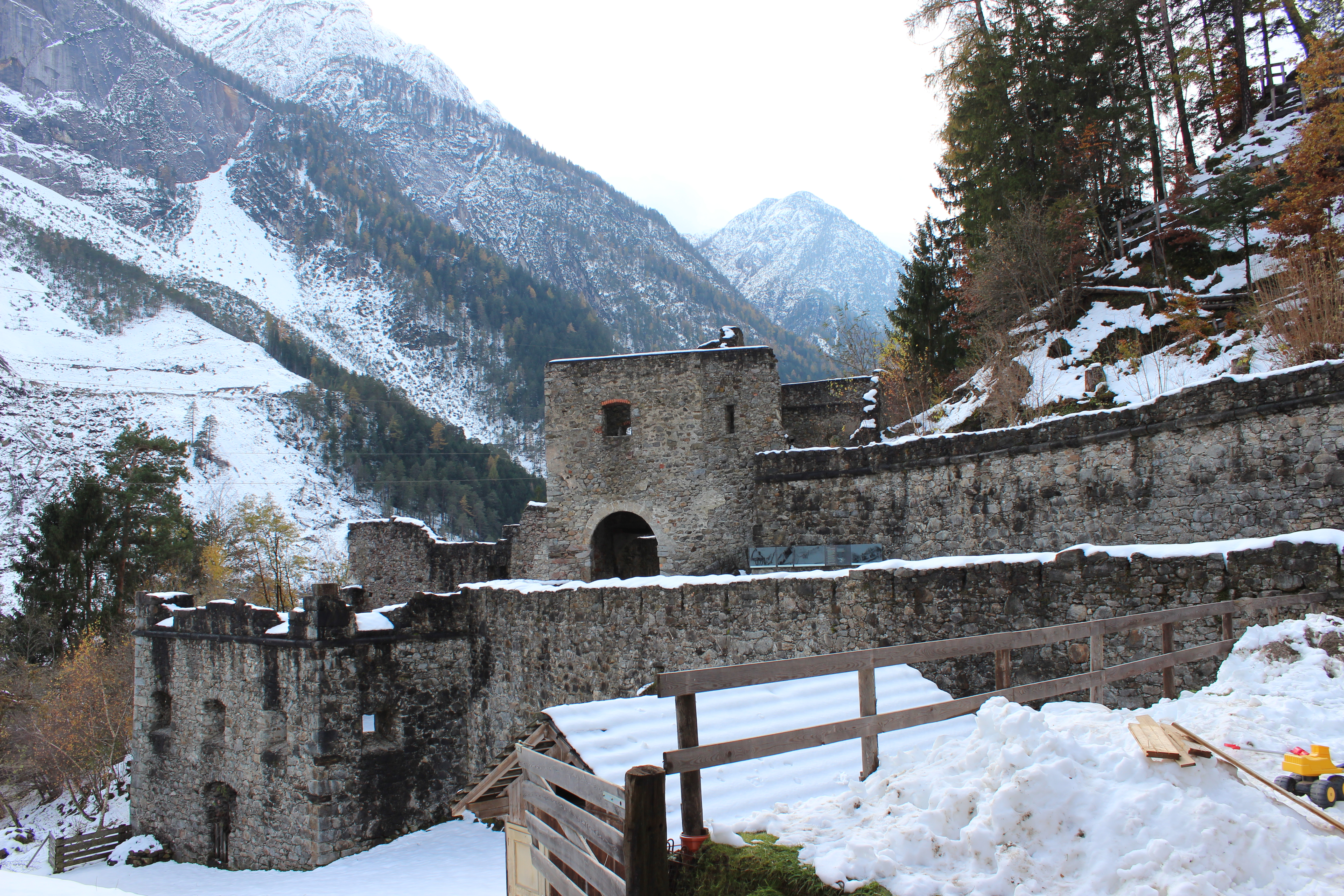 Festungsanlage Lienzer-Klause in Leisach.